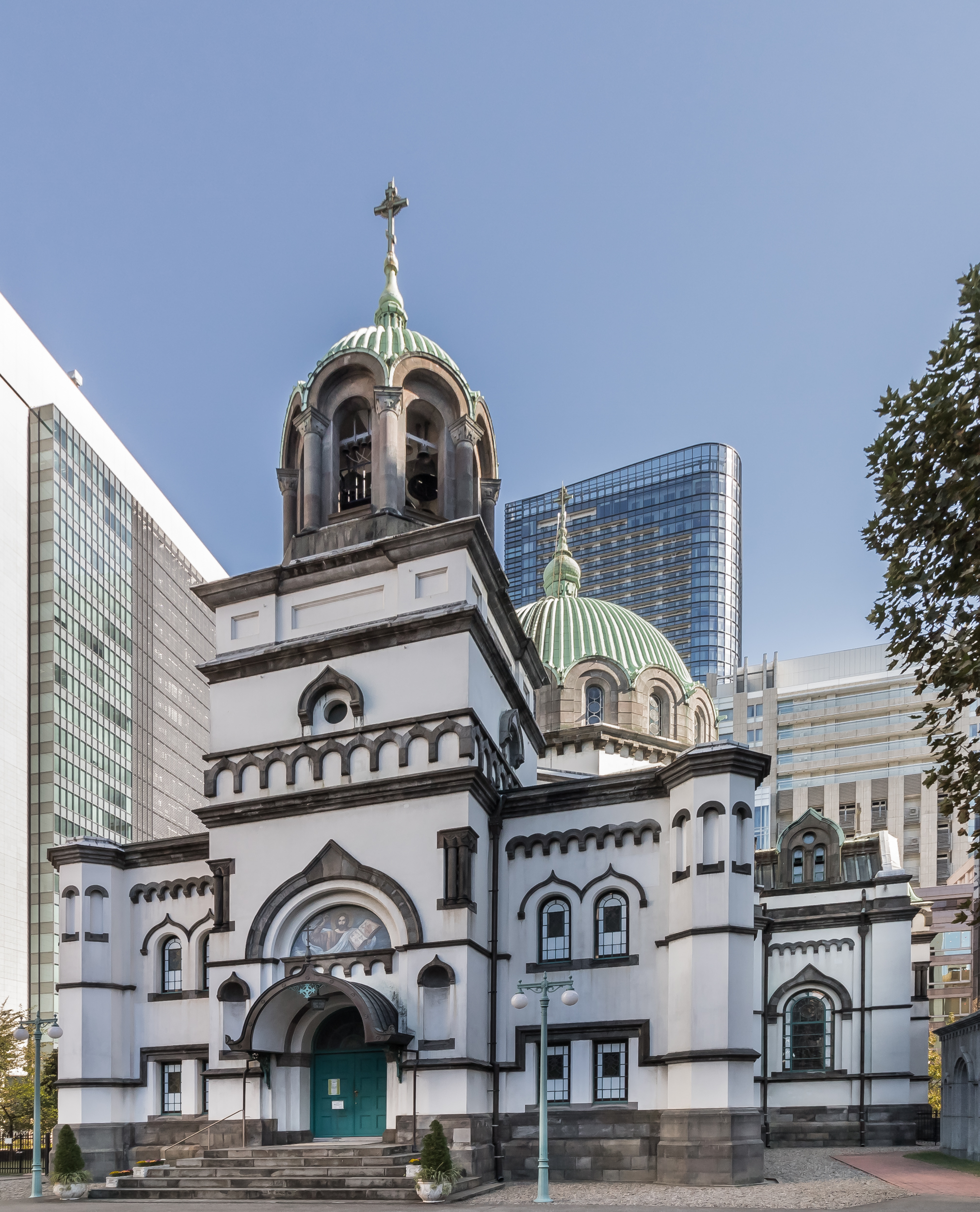 東京復活大聖堂、「ニコライ堂」（重要文化財）